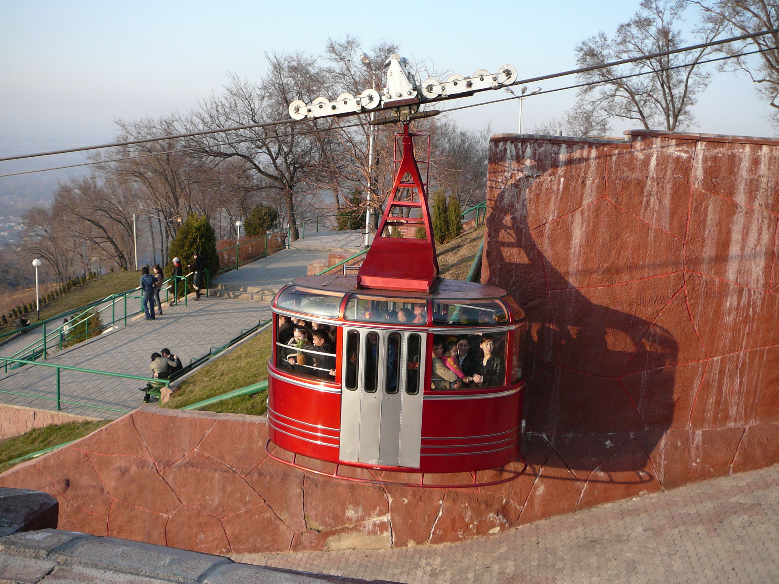 Кабина подвесной канатной дороги на подходе к Кок-Тюбе